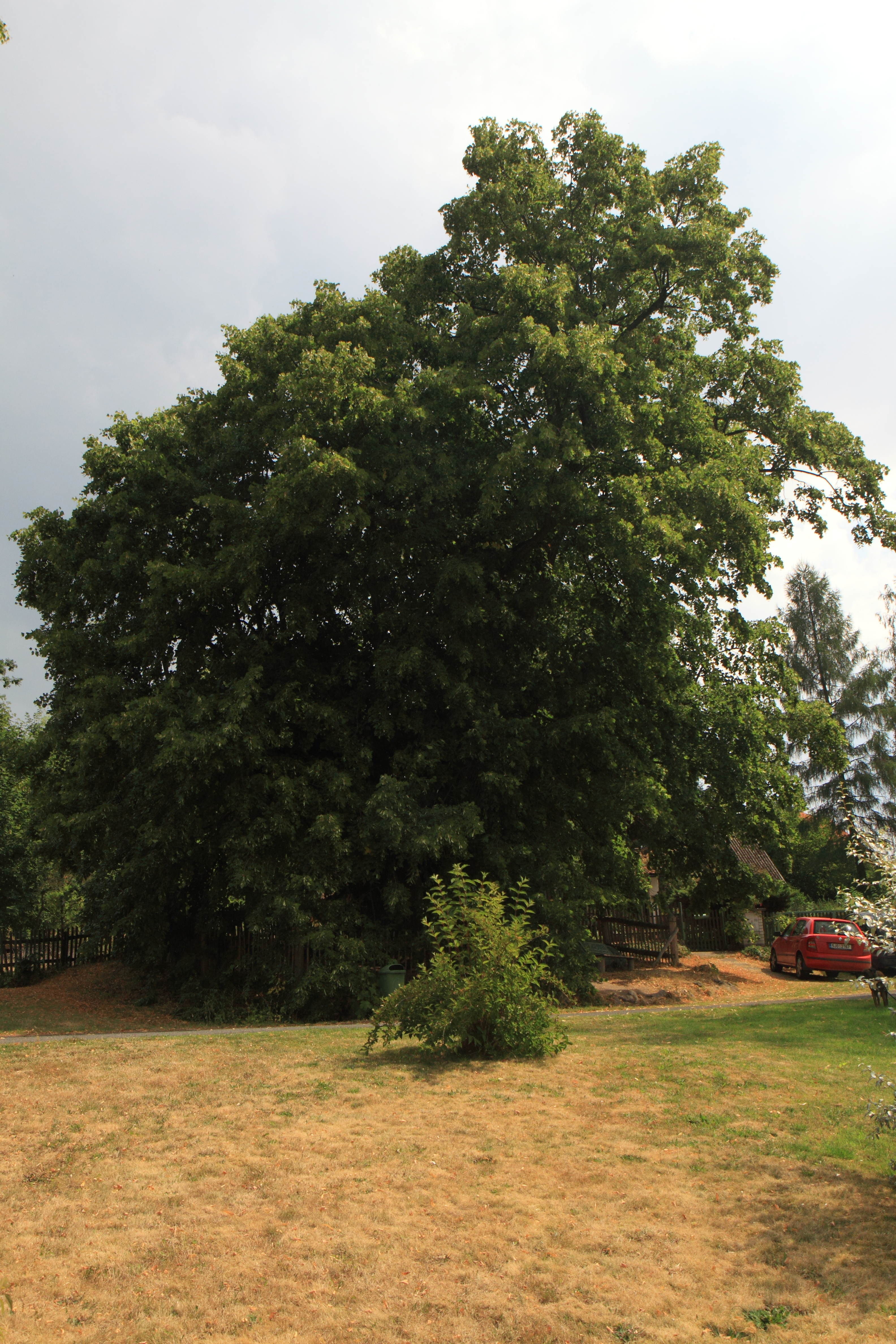 Klokočovská lípa